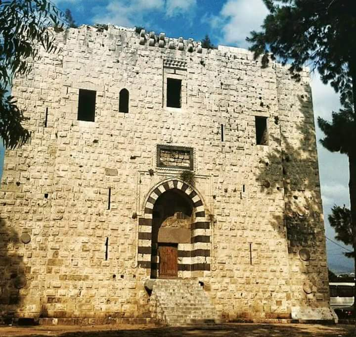 برج برسباي الأثري في طرابلس